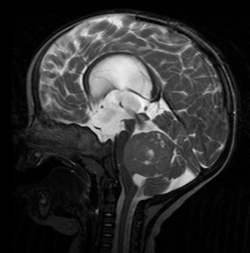 Medulloblastom in der MRT